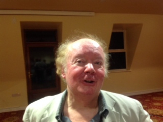 Alan Titley ag Oireachtas na Gaeilge 1015